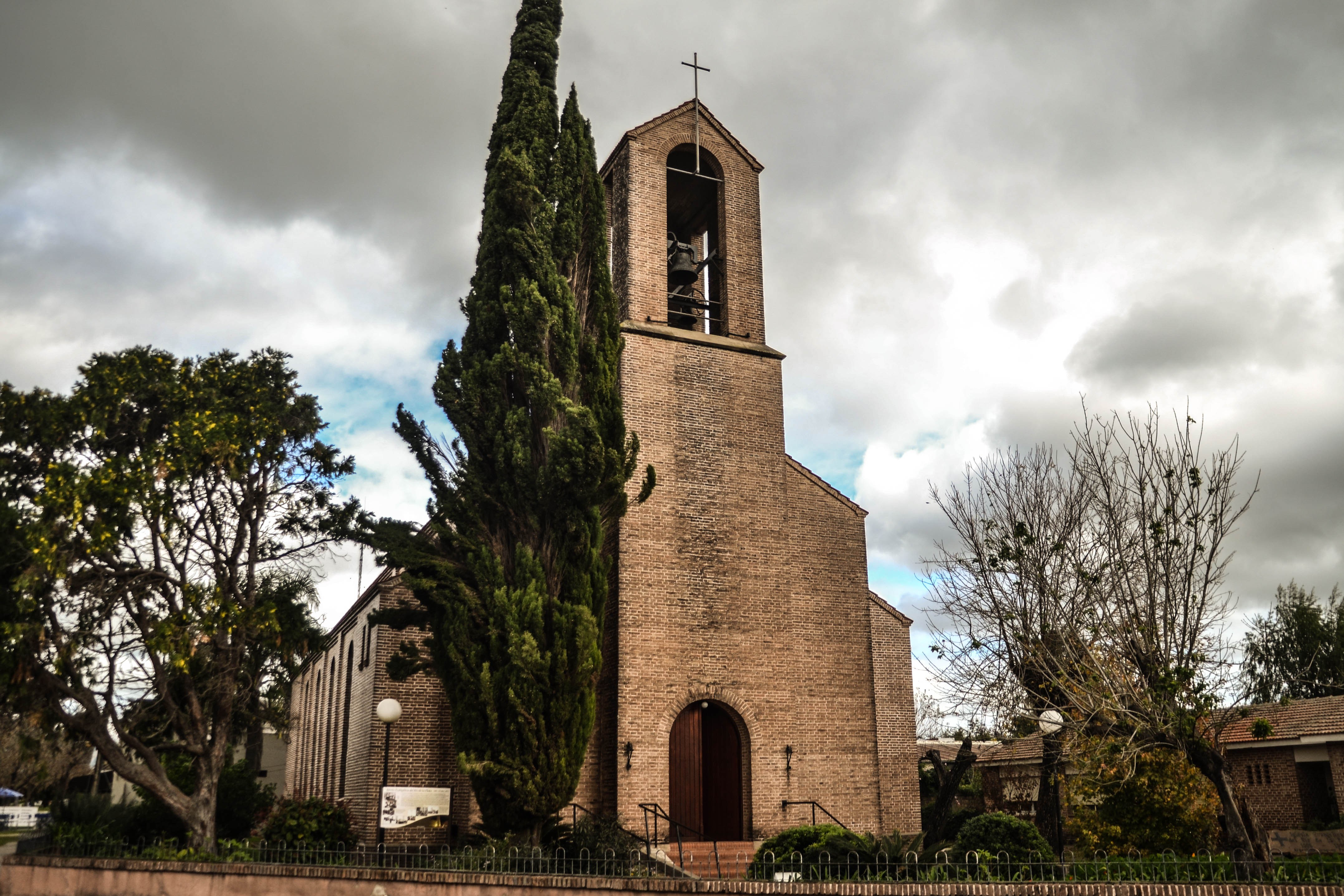 Iglesia evangélica del Río de la Plata - Humboldt (Santa Fe)